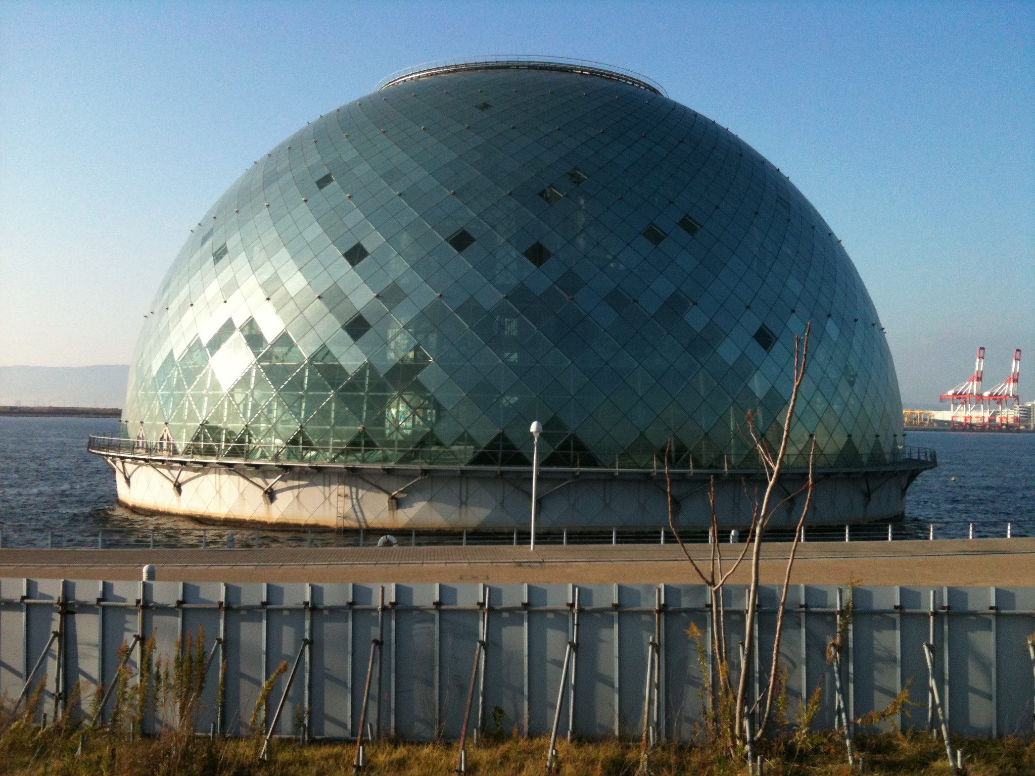 nan-koh port of sauth osaka